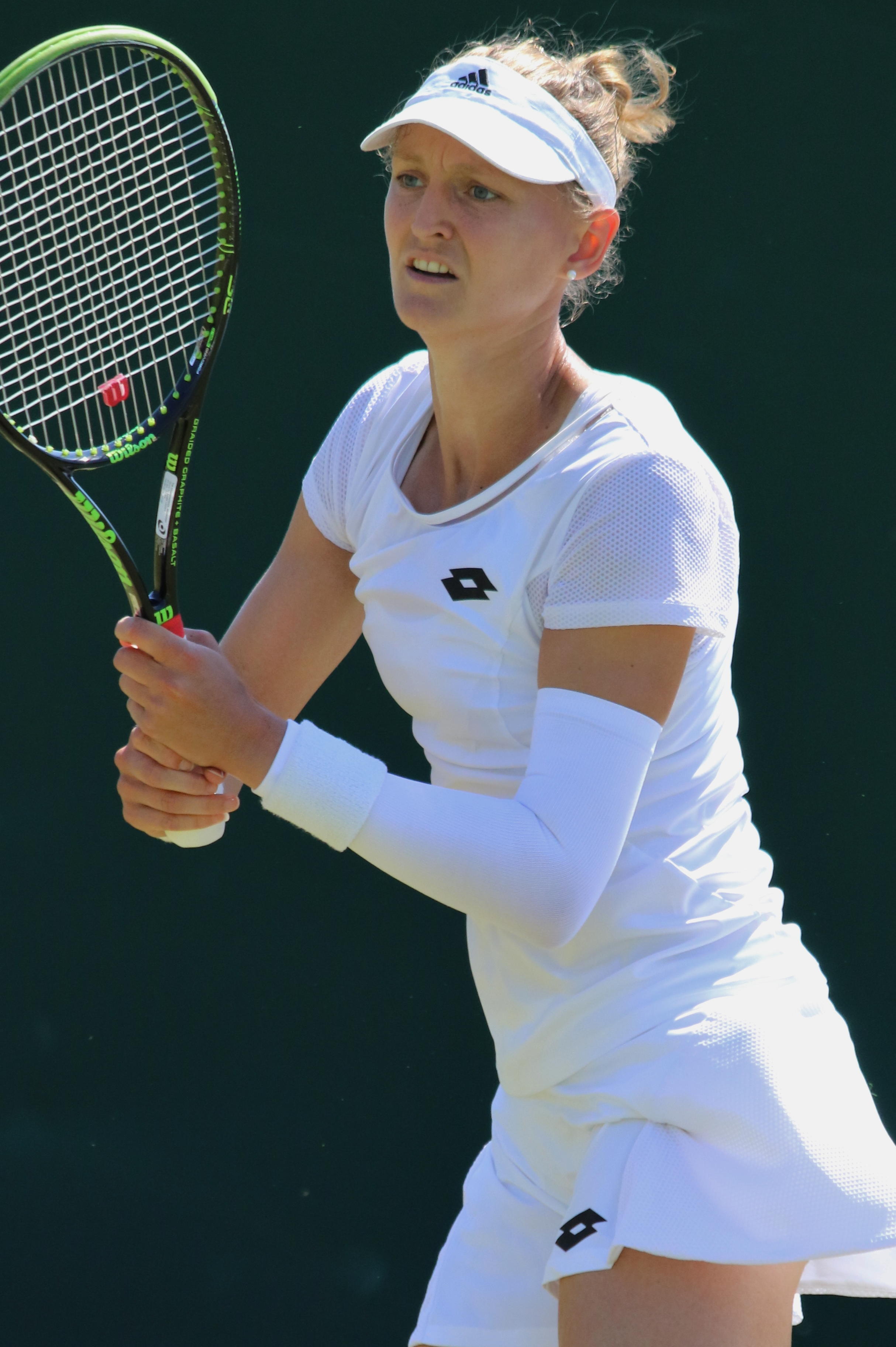 Murray WMQ18 (1)